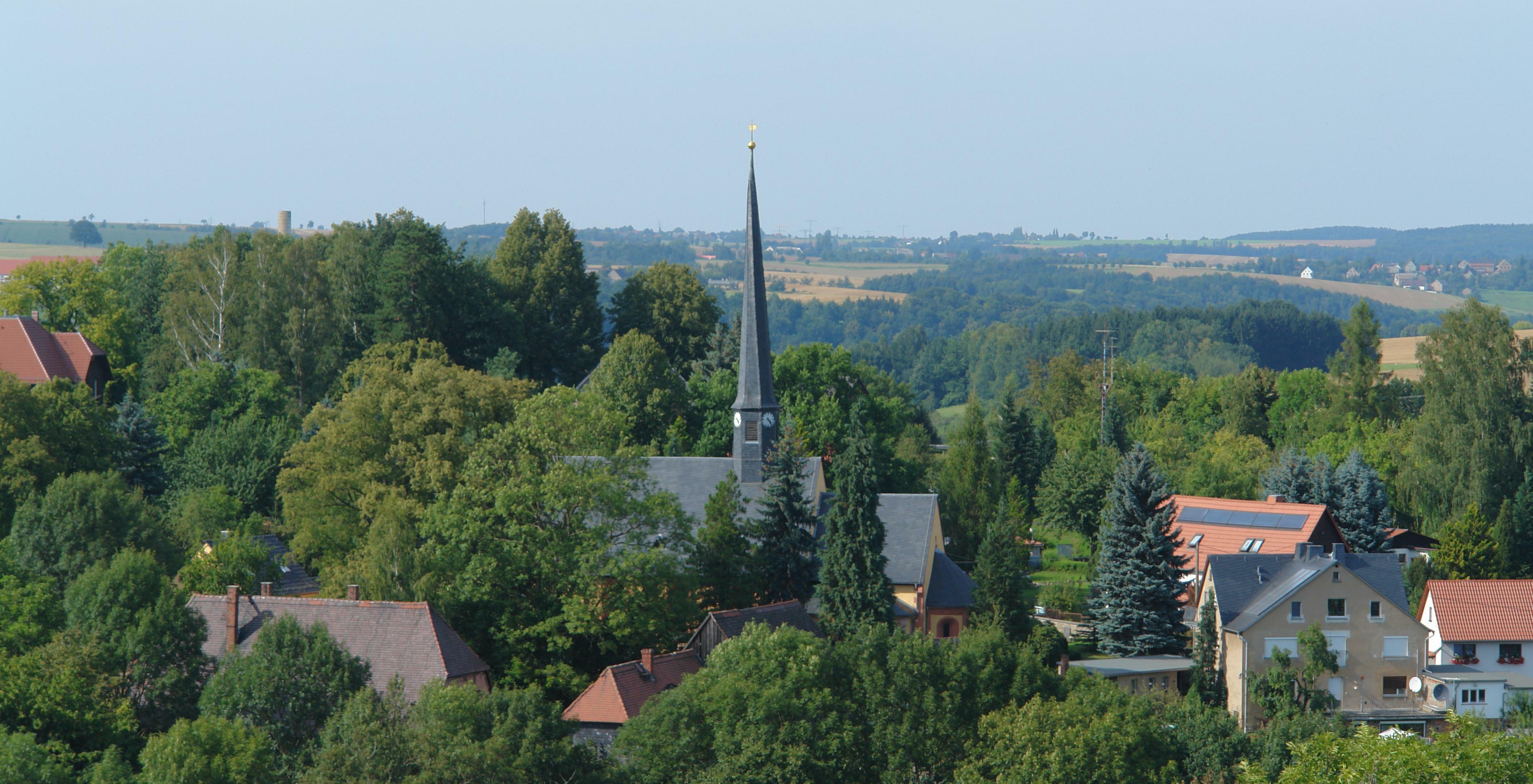 Rochsburg